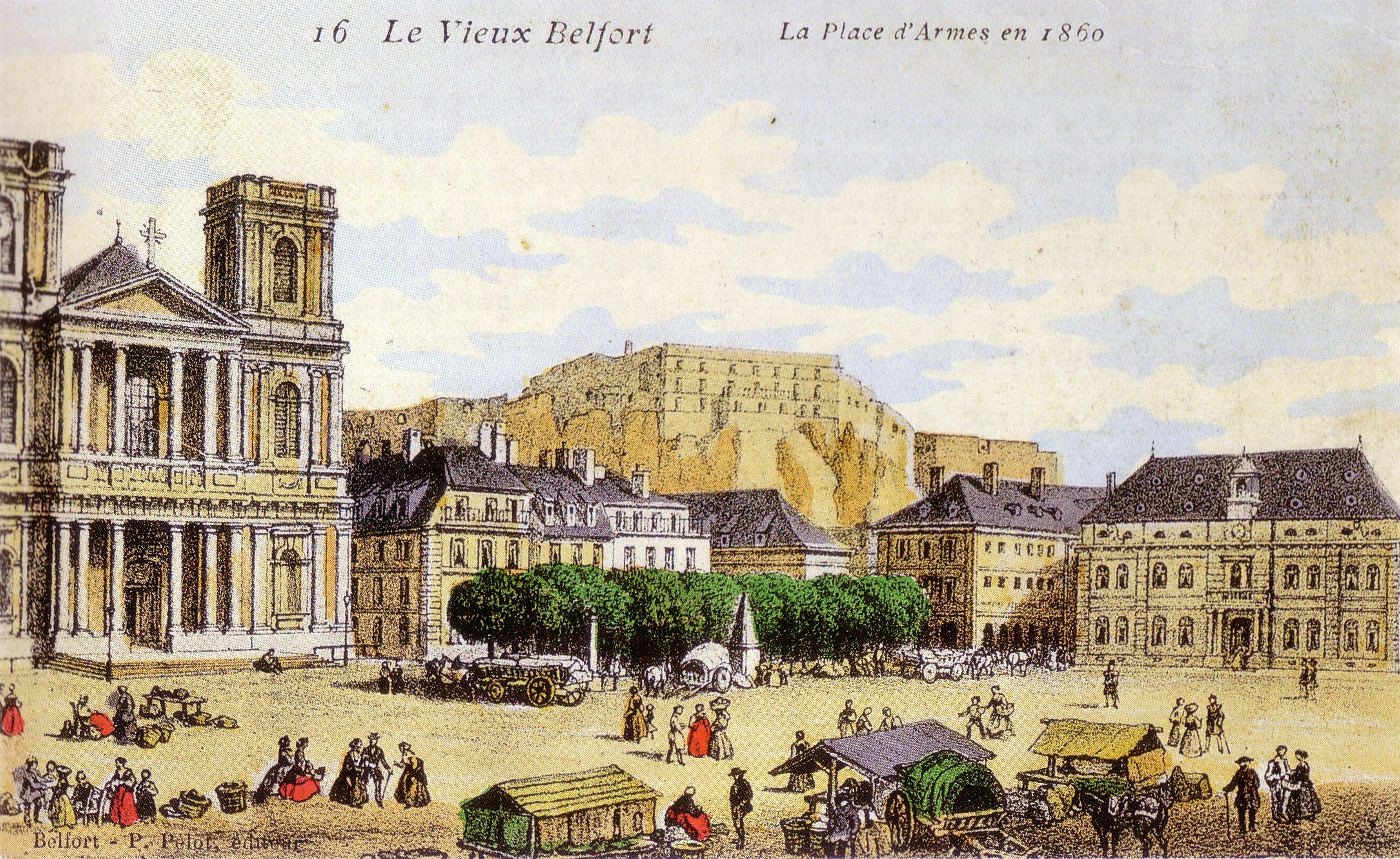 Aquarelle représentant le centre de Belfort en 1860